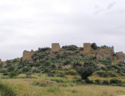 Castell del Riu (Asp, Vinalopó Mitjà, País Valencià)